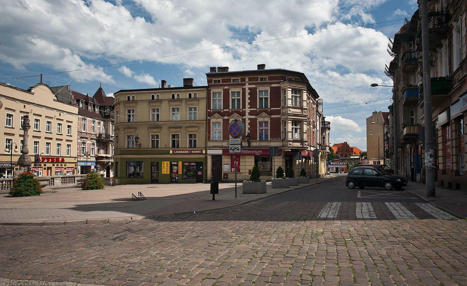 Plac zwany Rynkiem Rybnym. Grudziądz, oprócz rynku głównego, zwanego zwyczajnie Rynkiem, miał dawniej Rynek Zbożowy - dziś to aleja 23 Stycznia. Z lewej